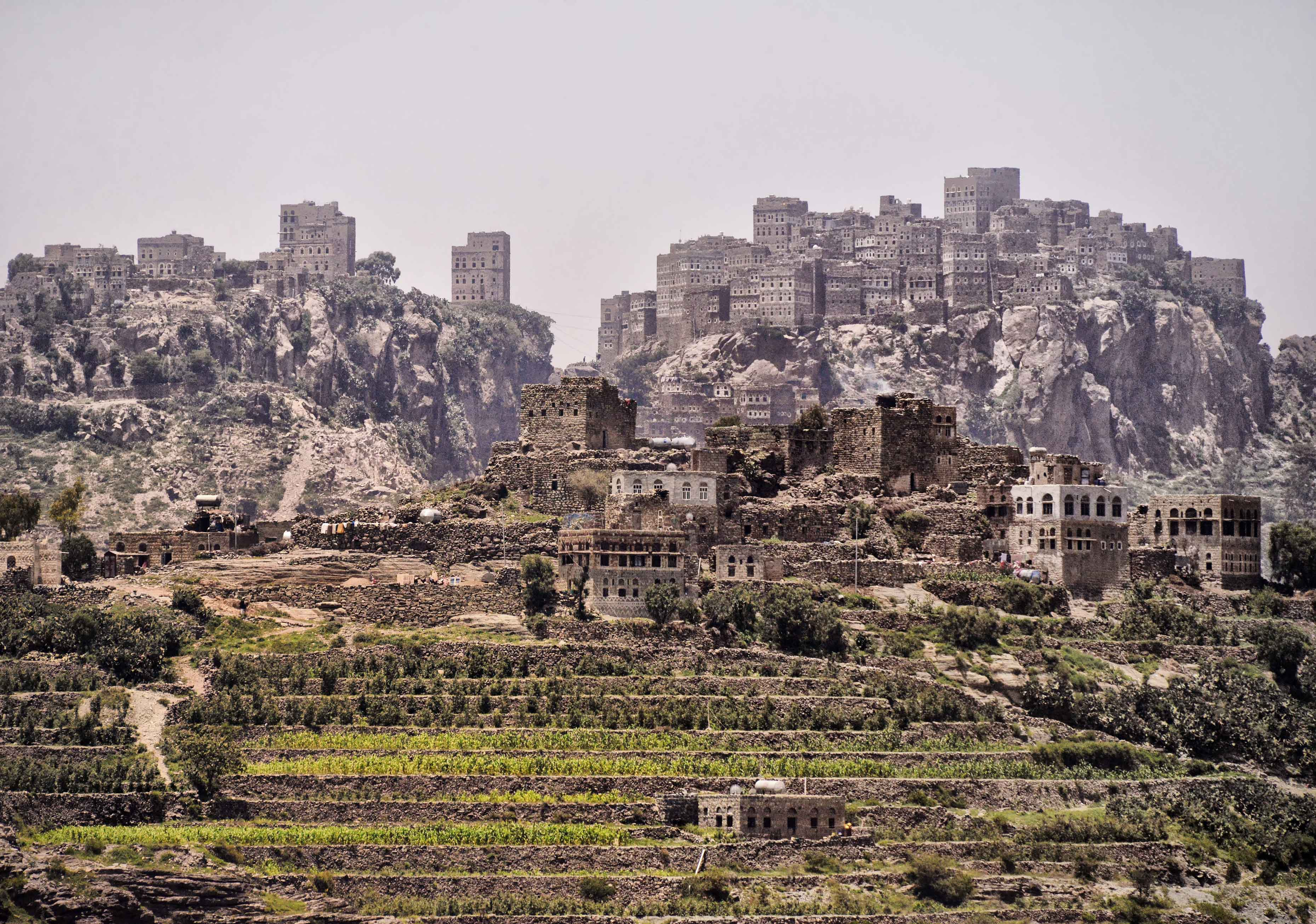 Yemen